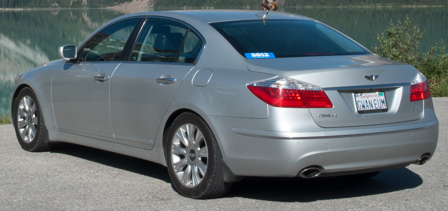 Hyundai Genesis